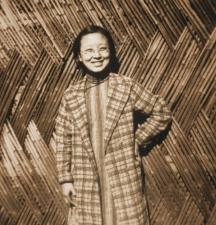 朱旦華（1911年—2010年），又稱朱丹華，著名女革命家、中華人民共和國女政治家。朱旦華生前是毛澤民妻子，毛遠新之生母。浙江省寧波市慈溪縣庄橋鎮人。2010年逝世，享年99歲，為毛澤東家族享壽最久之成員。